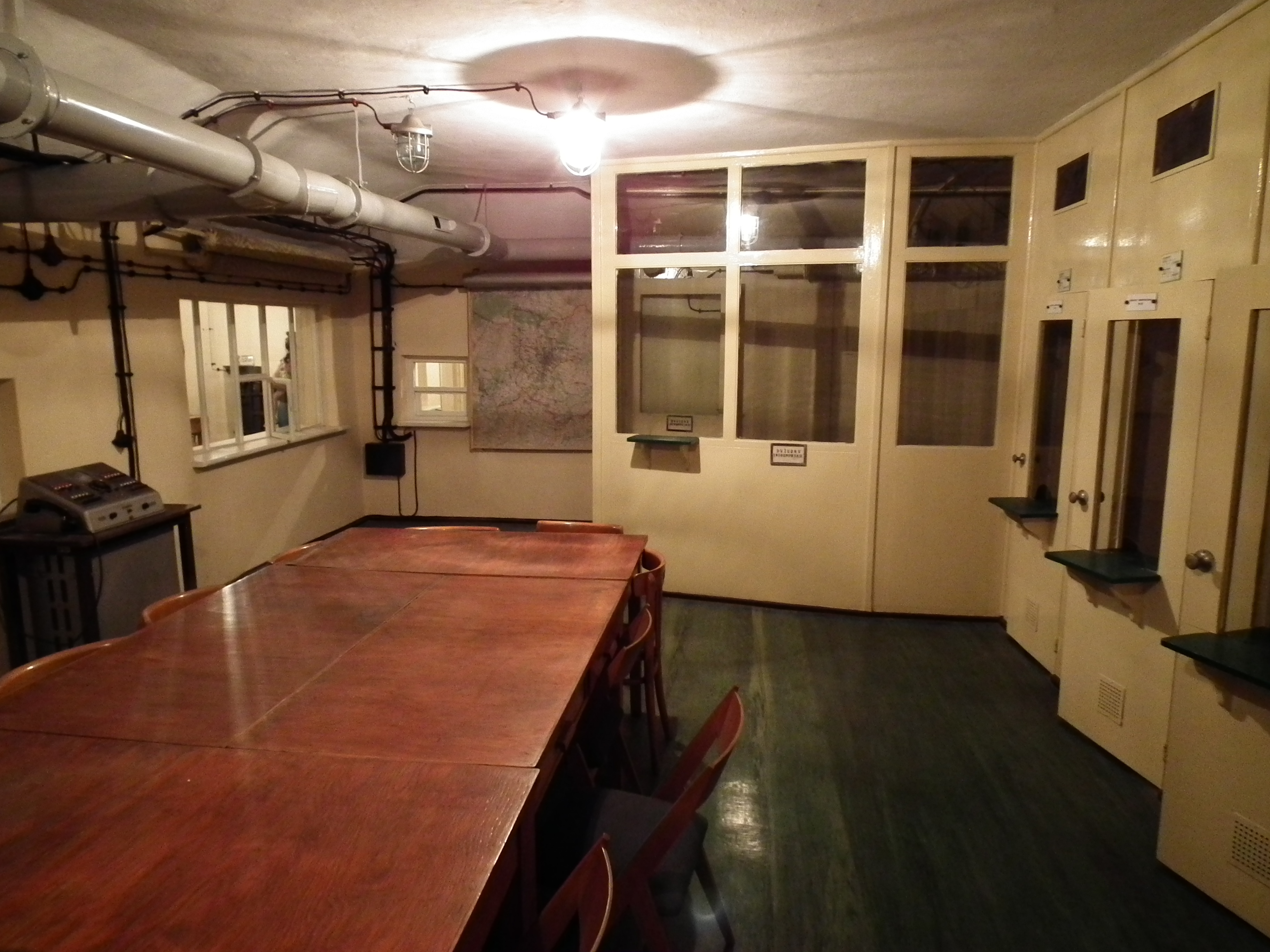 Schron przeciwatomowy prezydenta Poznania - ul. Polanowska. Dni Twierdzy Poznań - 27.8.2016r.